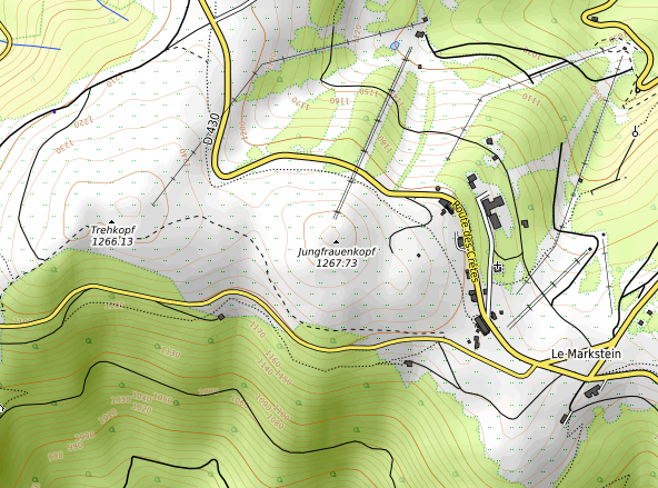 carte réalisée sur umap This map may be incomplete, and may contain errors. Don't rely solely on it for navigation.